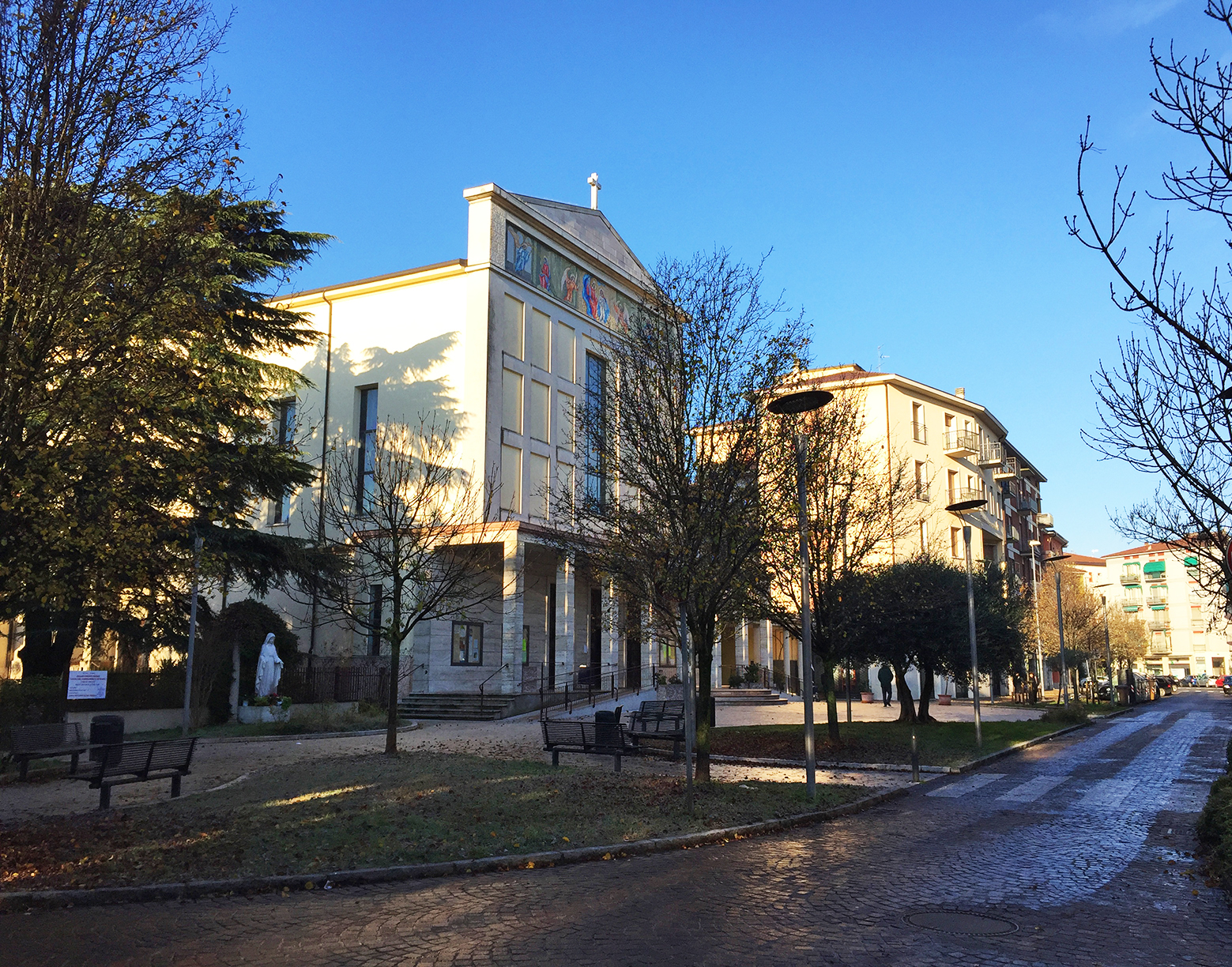 via Ottavio Caccia